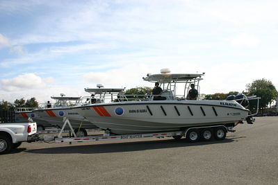 Lanchas Elnath (LI-161), Polaris (LI-162), Nunki (LI-163).